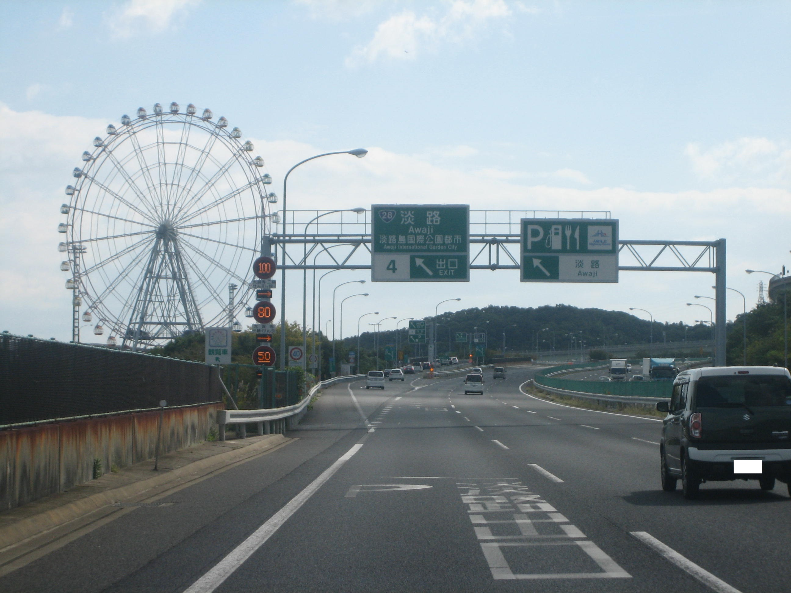 淡路IC